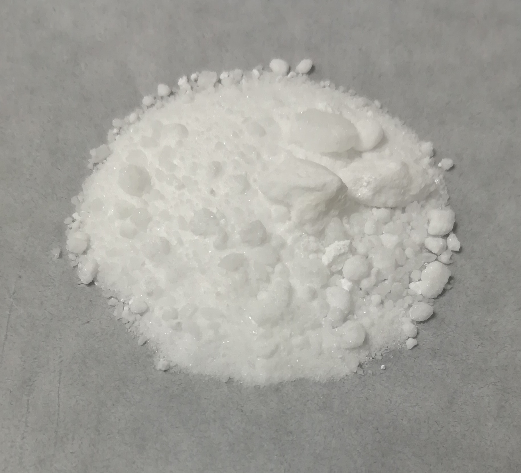 中文（中国大陆）: 乙酸钆(III)的样品